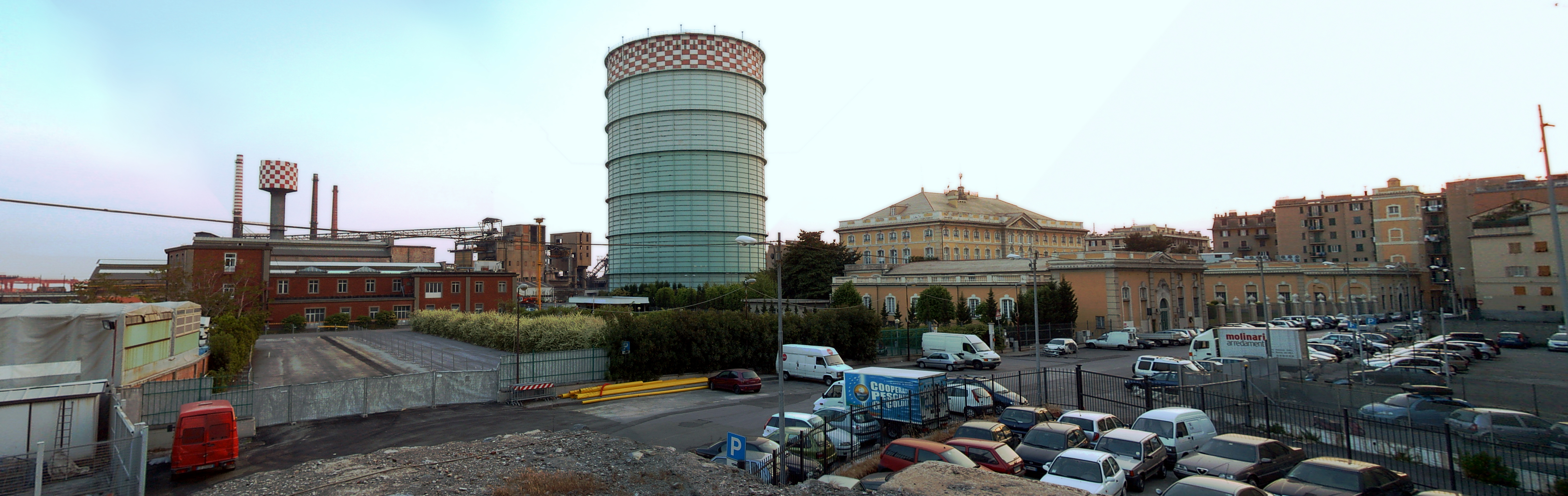 Villa Bombrini sovrastata dalle fabbriche